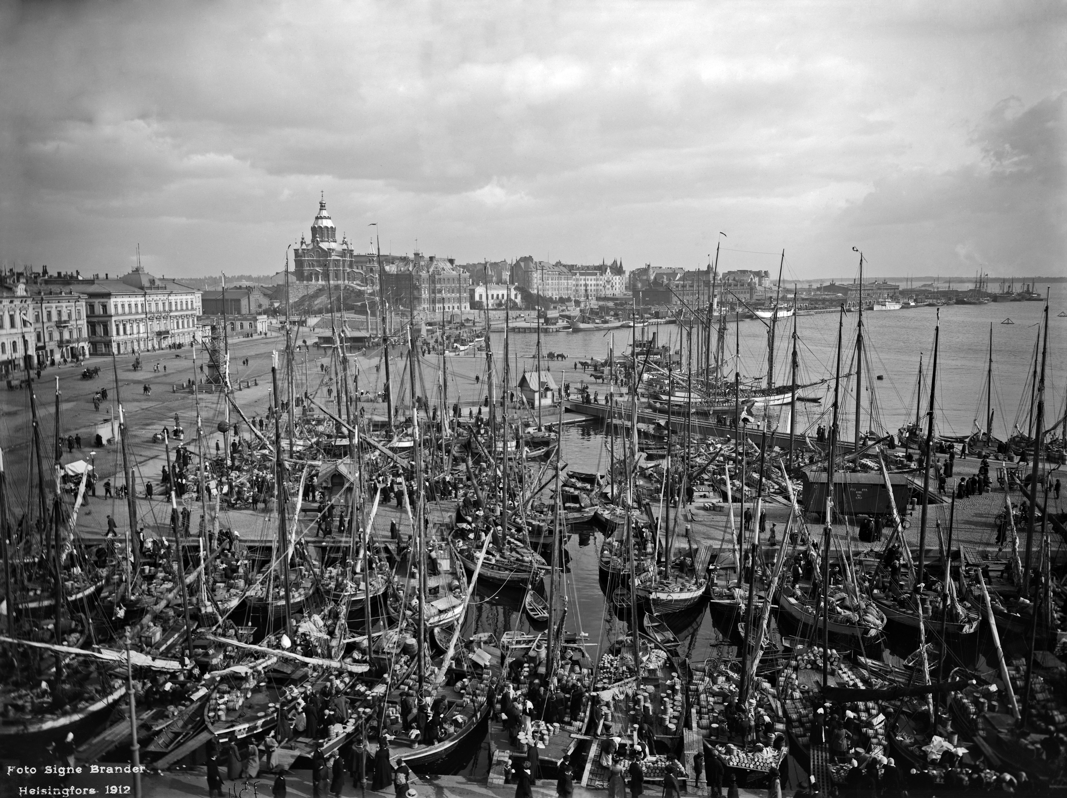 Syysmarkkinat Eteläsatamassa. Kalastajien purjealuksia Kolera-altaassa. -- negatiivi ja vedos, lasi paperi pahvi, mv